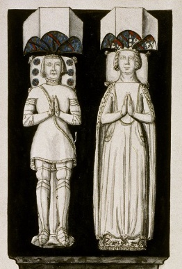 John of Bourbon-La Marche and Catherine of Vendôme